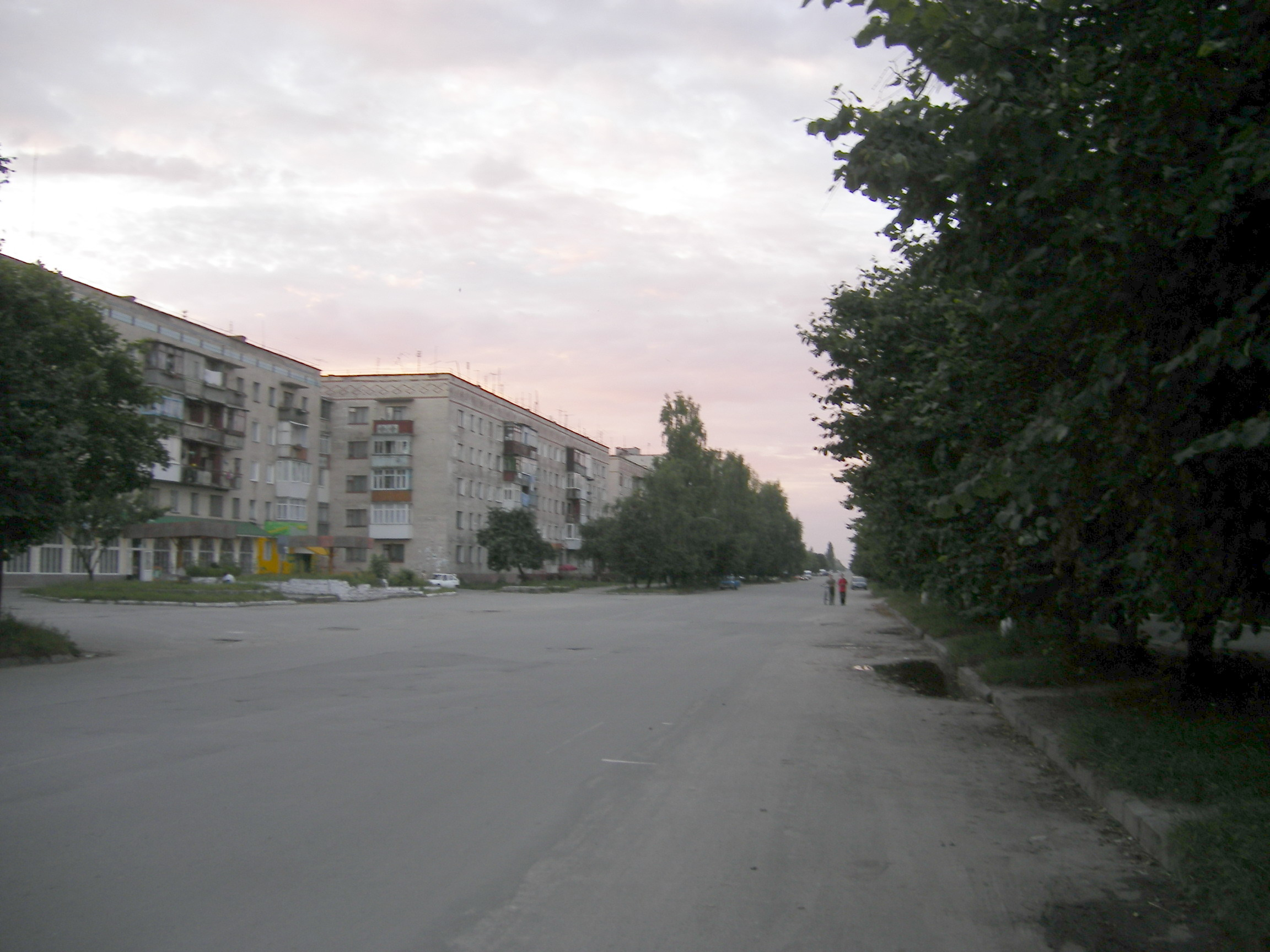 Shepetivka, street view